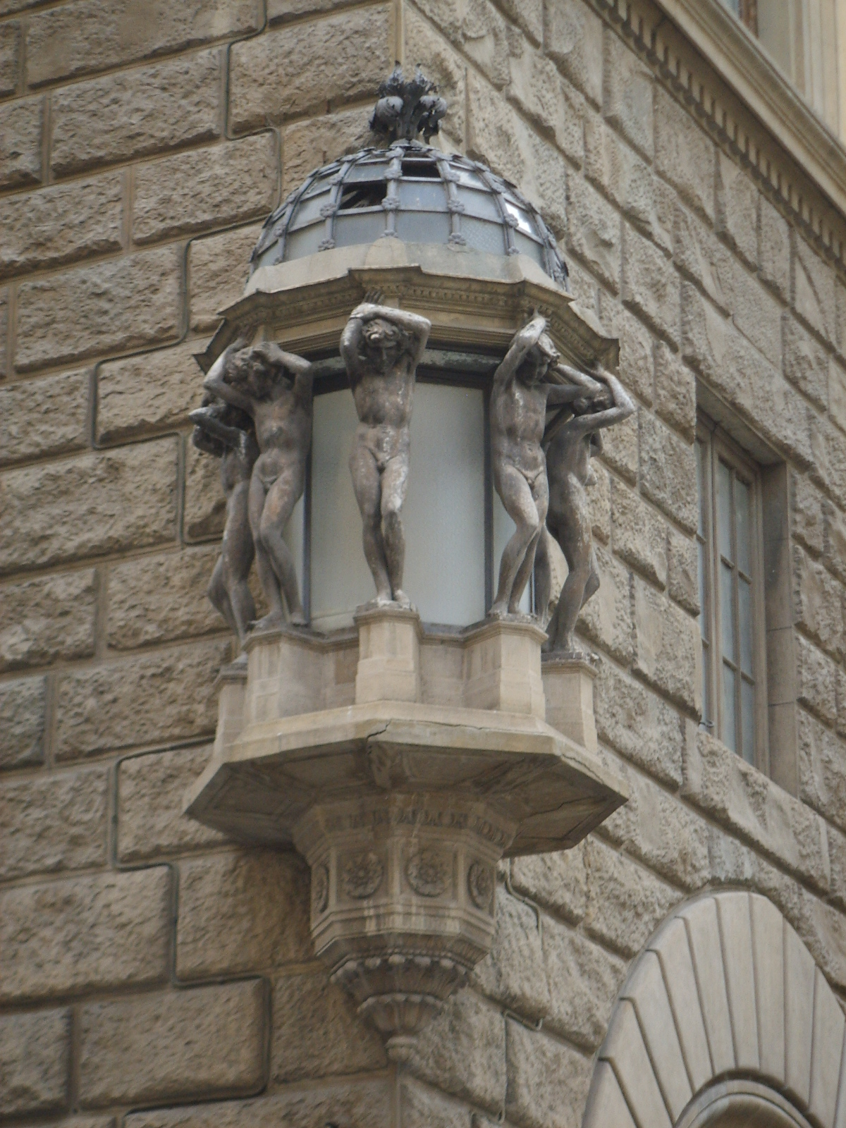 Palazzo dello strozzini, edicola